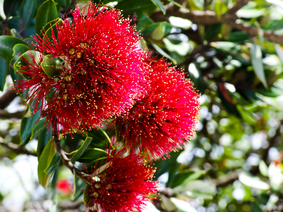 A Native Metrosideros excelsa